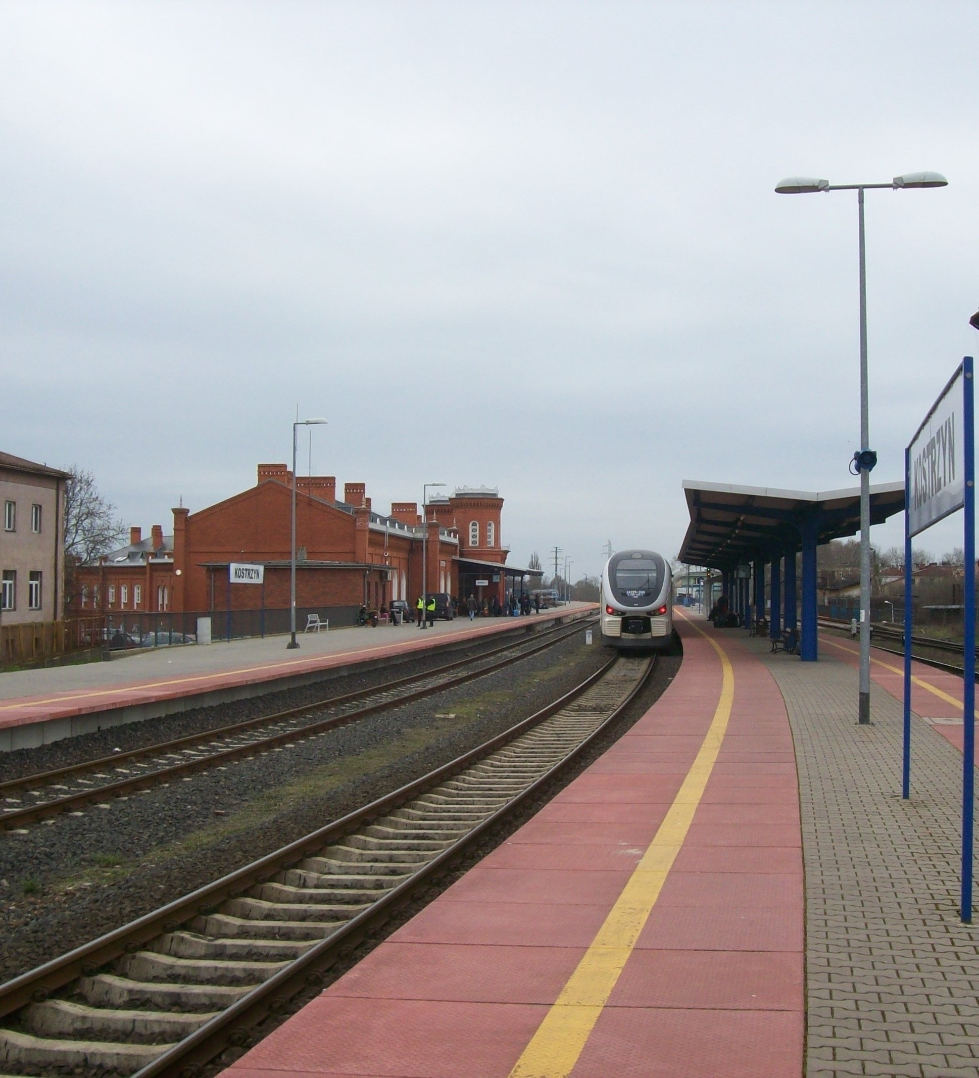 Kostrzyn nad Odrą - widok na perony górnego poziomu stacji.